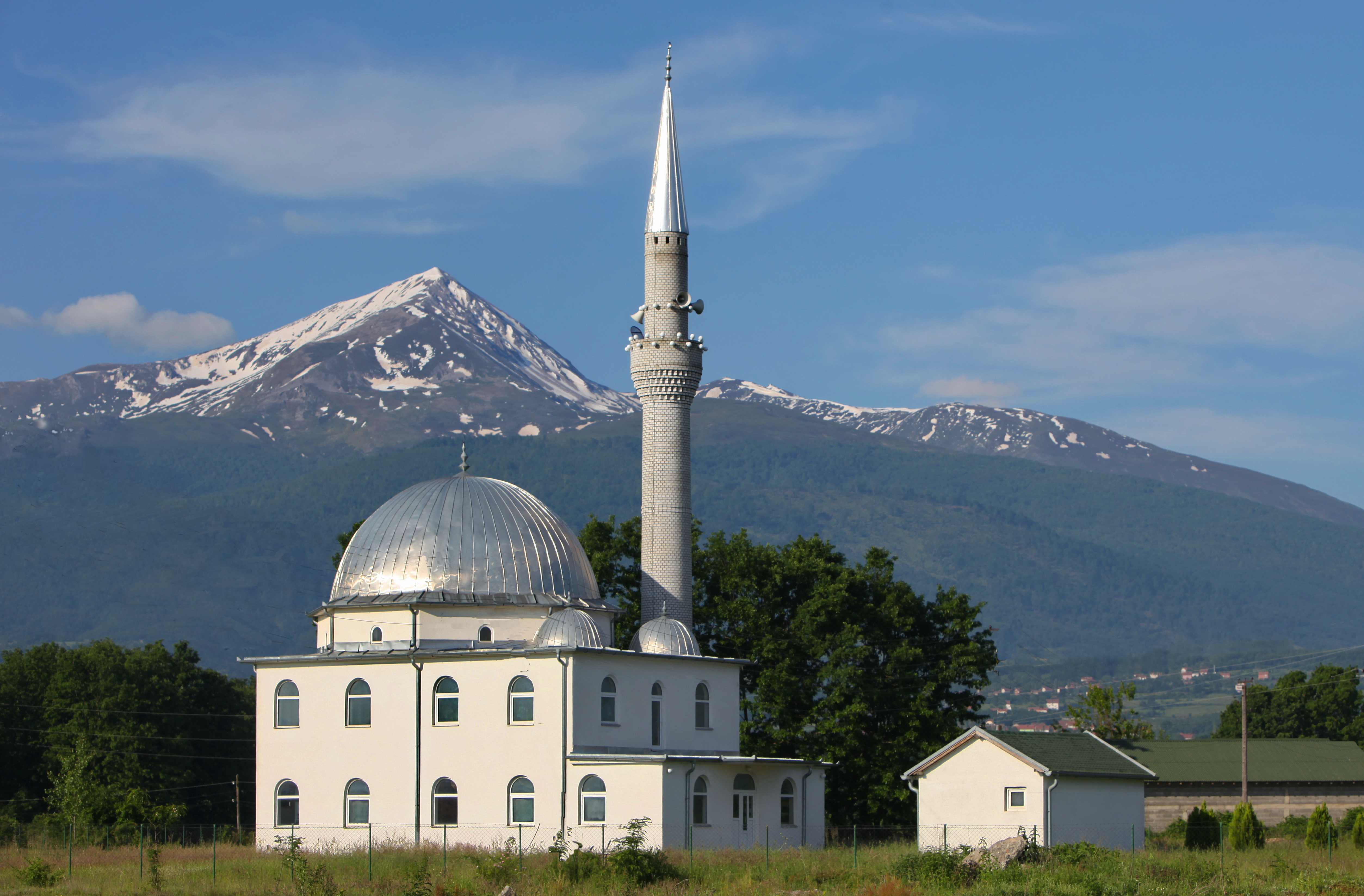 Šar planina i nova džamija 25.svibnja. 2010.